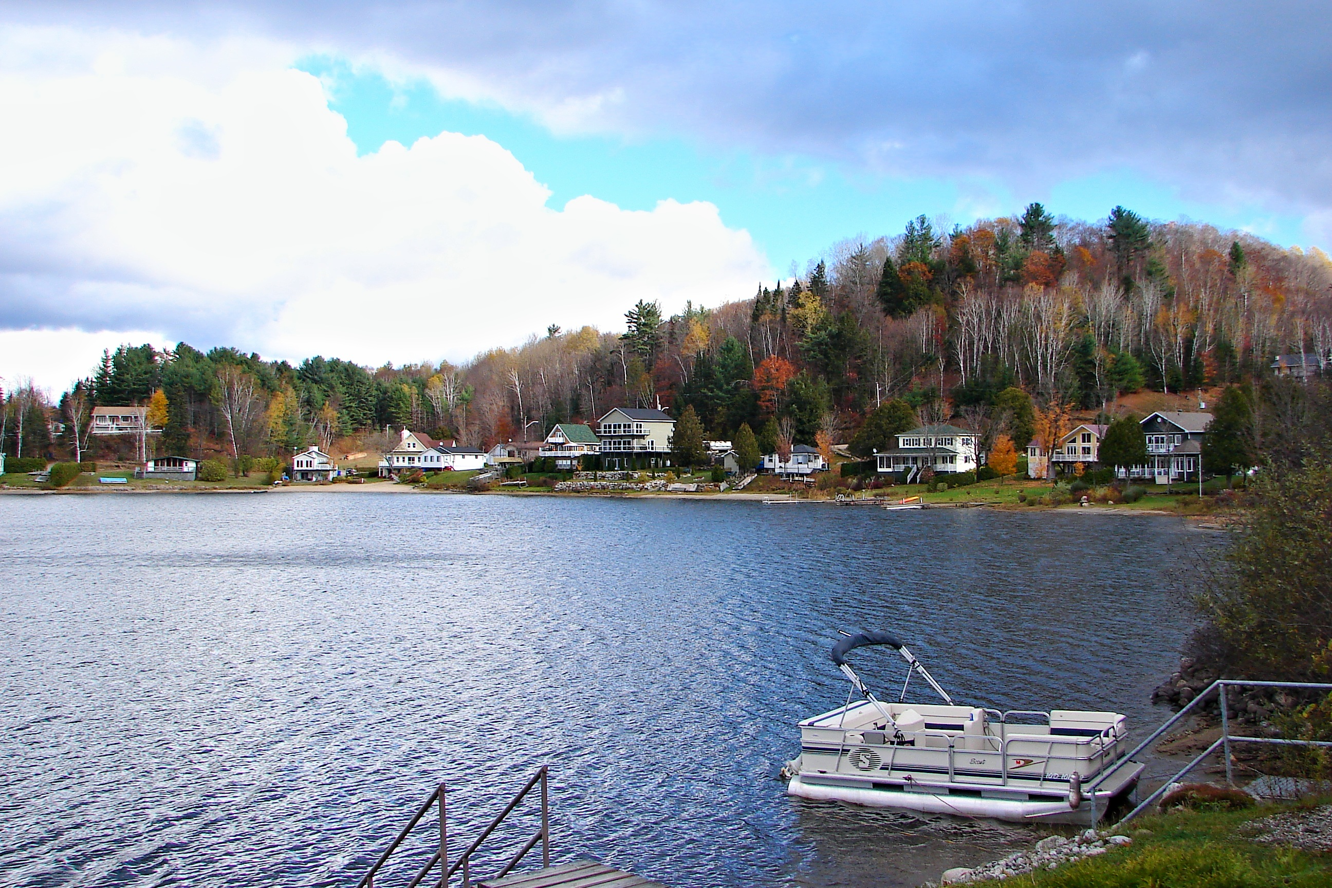 Lac-Simon, Outaouais, Quebec, Canada